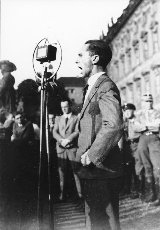 Berlin-Lustgarten, Rede Joseph Goebbels Goebbels spricht bei einer nationalsozialistischen Protestversammlung im Berliner Lustgarten gegen das Ergebnis der Konferenz von Lausanne. [Berlin-Lustgarten.- Joseph Goebbels bei Rede vor Mikrophon; Juli 1932] Abgebildete Personen: Goebbels, Joseph: Reichsminister für Volksaufklärung und Propaganda, Gauleiter Berlin, Deutschland